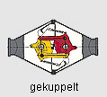 Gekuppelte Schaku